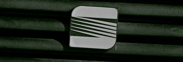 logotipo SEAT de los años 80 ( característica que tiene 4 líneas centrales)